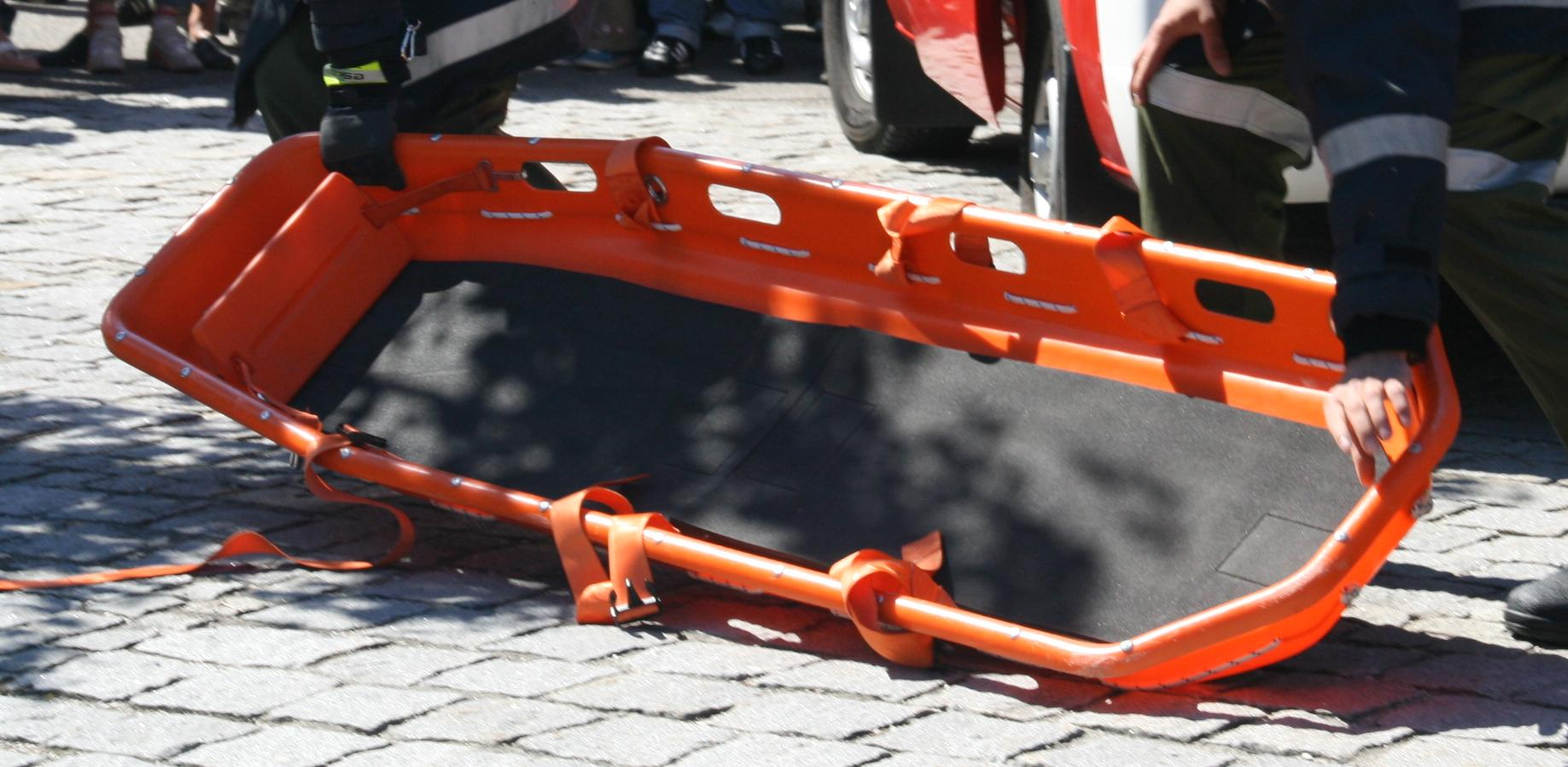 gurney for fire brigade/ Korbtrage für Feuerwehr